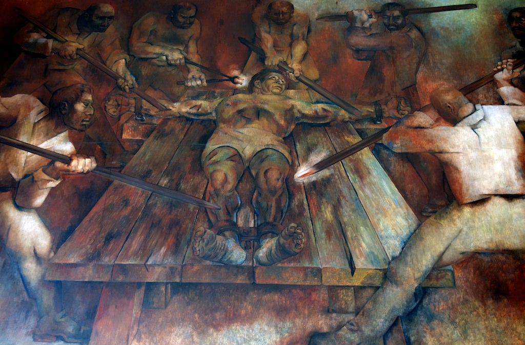 Mural de Jacinto Canek de Fernando Castro Pacheco en Palacio de Gobierno, Yucatán, México.